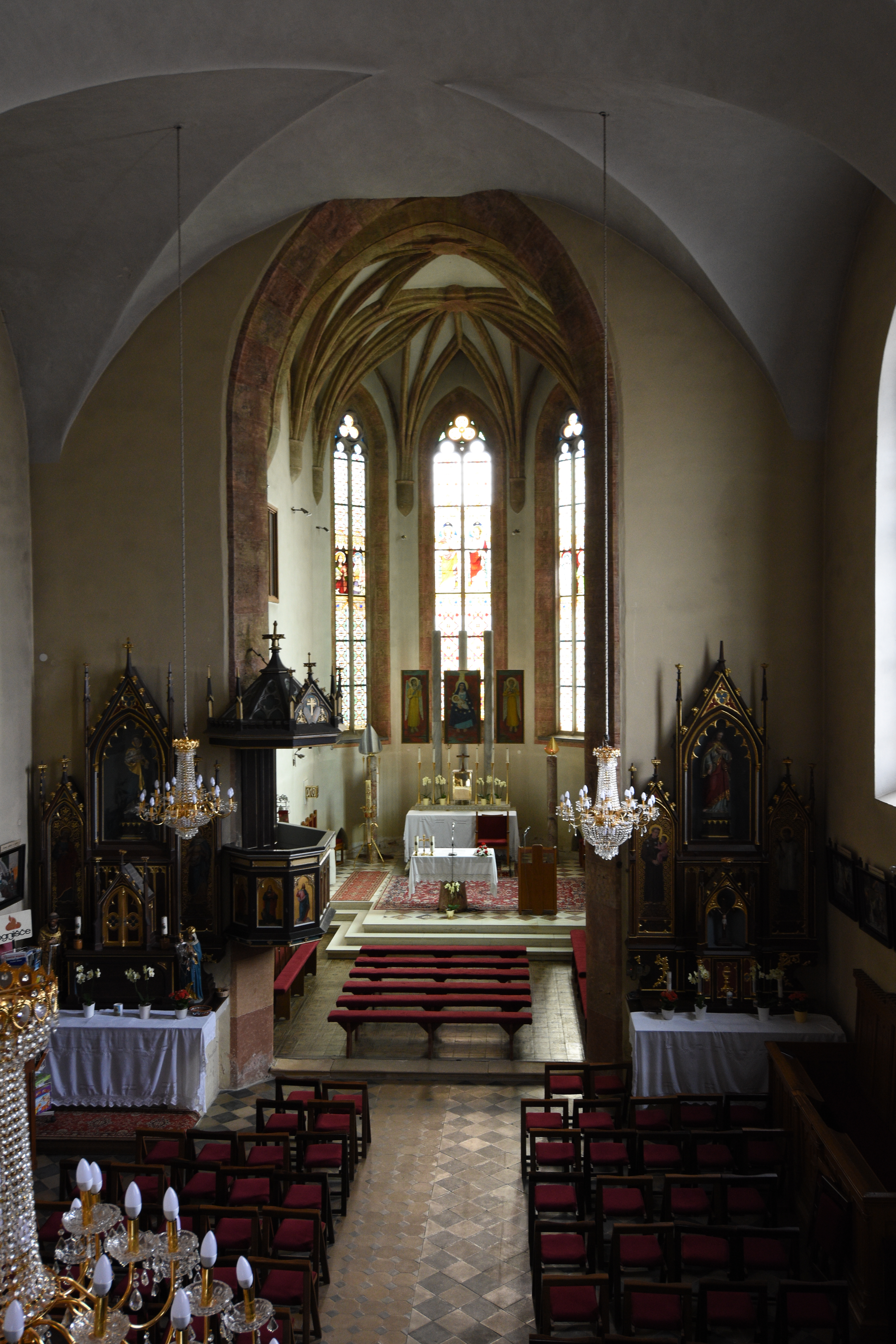 Nativity of Mary church Tišina Interior